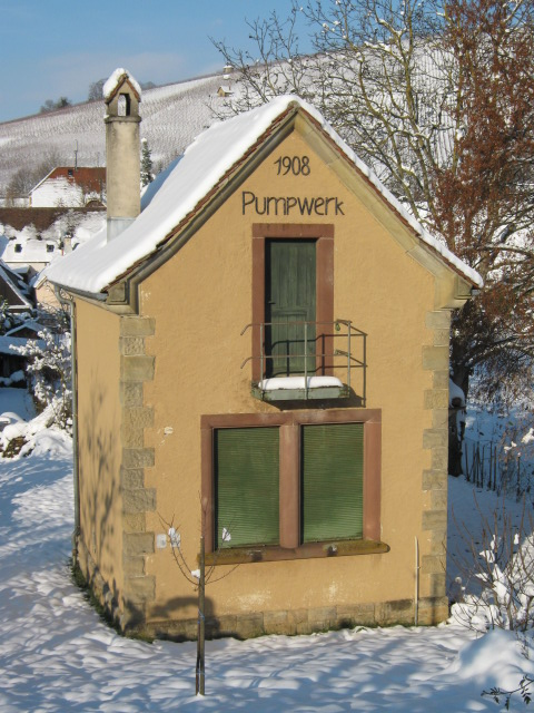 Pumpwerk Niederweiler, Müllheim (Baden), D. Baujahr 1906, Ortsmitte unterhalb der Ölbergstraße.